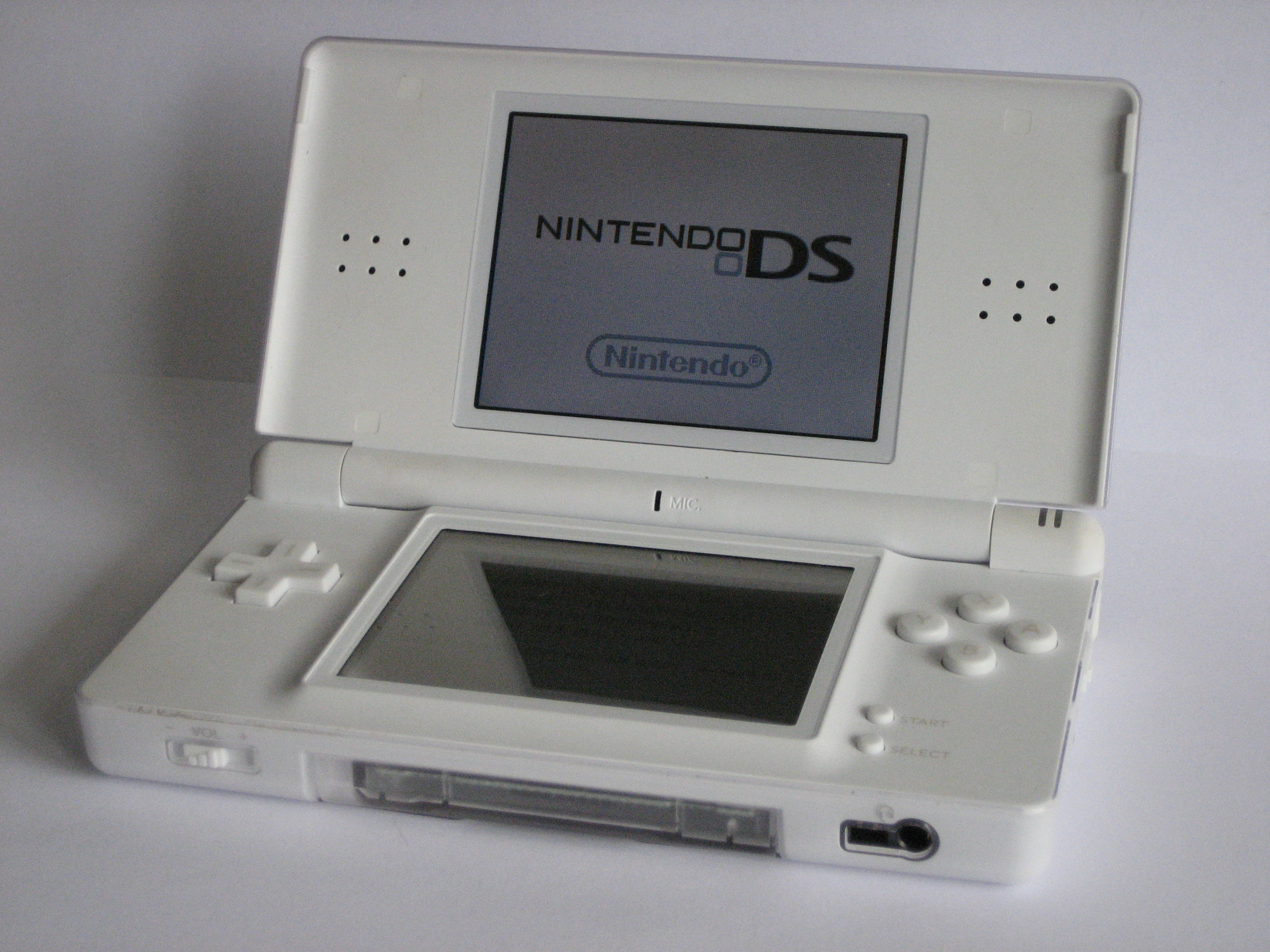 De Nintendo DS Lite met de D-pad links (de kruisvormige knop).